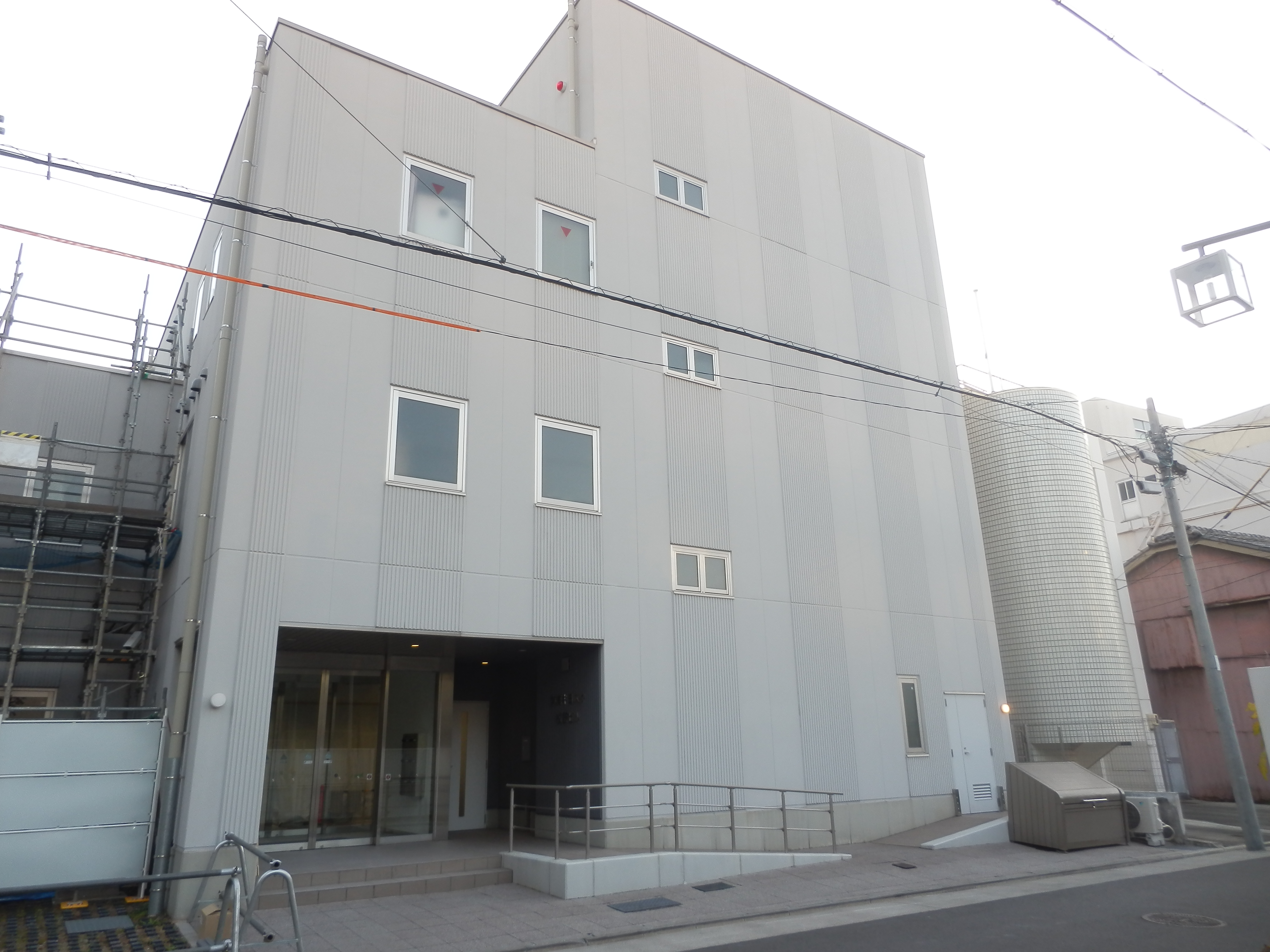 JR東海グループの東海キヨスクが所有する牧野ビル（名古屋市中村区太閤一丁目3-16）、同じJR東海グループのジェイアール東海パッセンジャーズ名古屋支店が入居する。